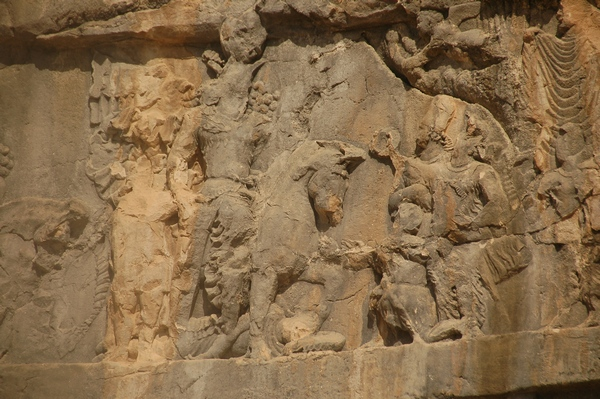 Cena central do terceiro relevo de Bixapur no qual Sapor recebe a submissão daquele que foi identificado como Urânio Antonino.